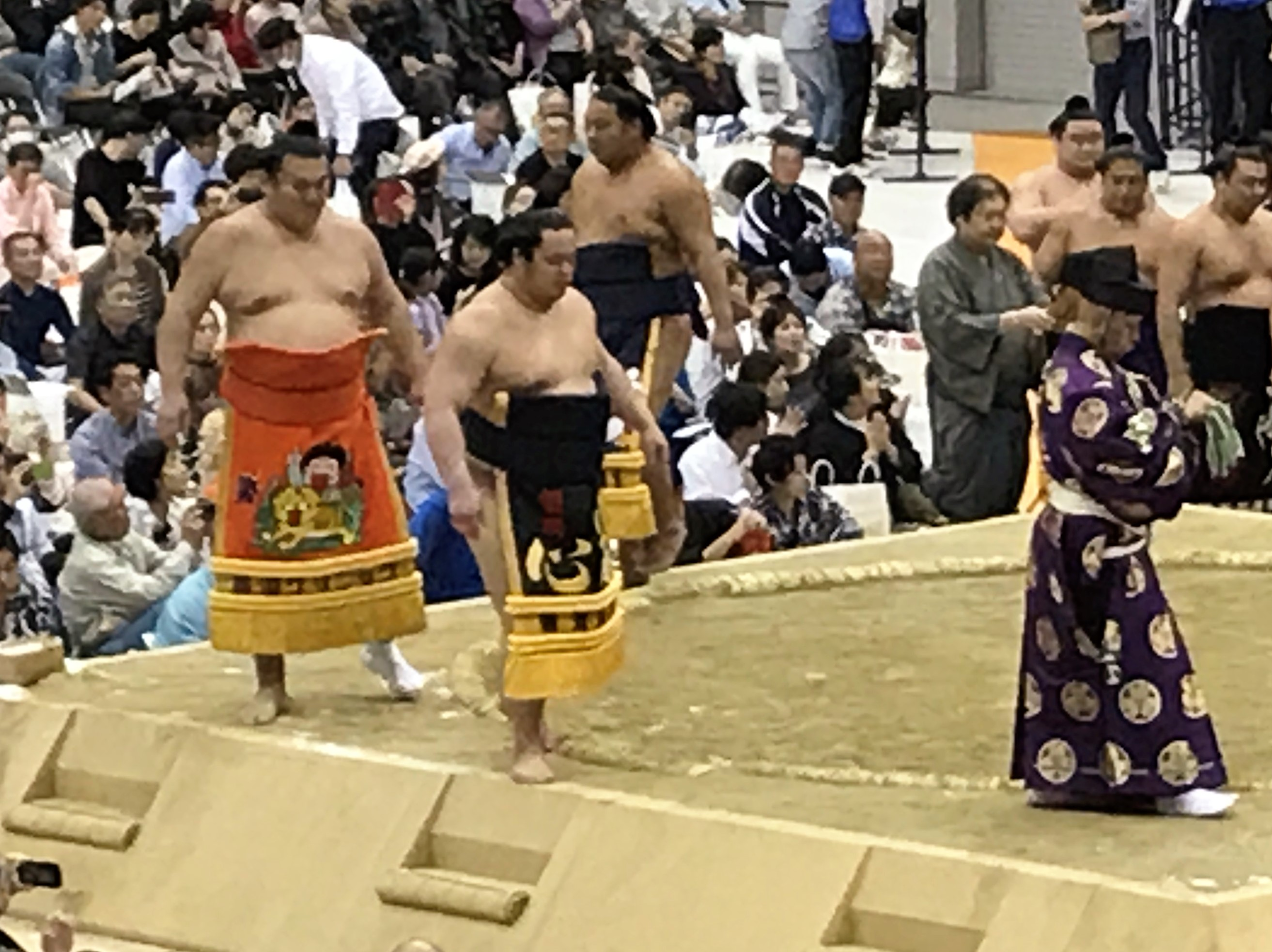 2019年10月の福山巡業でのja:勢翔太。高須クリニックによるja:化粧まわしが見える。デザインは、西原理恵子。